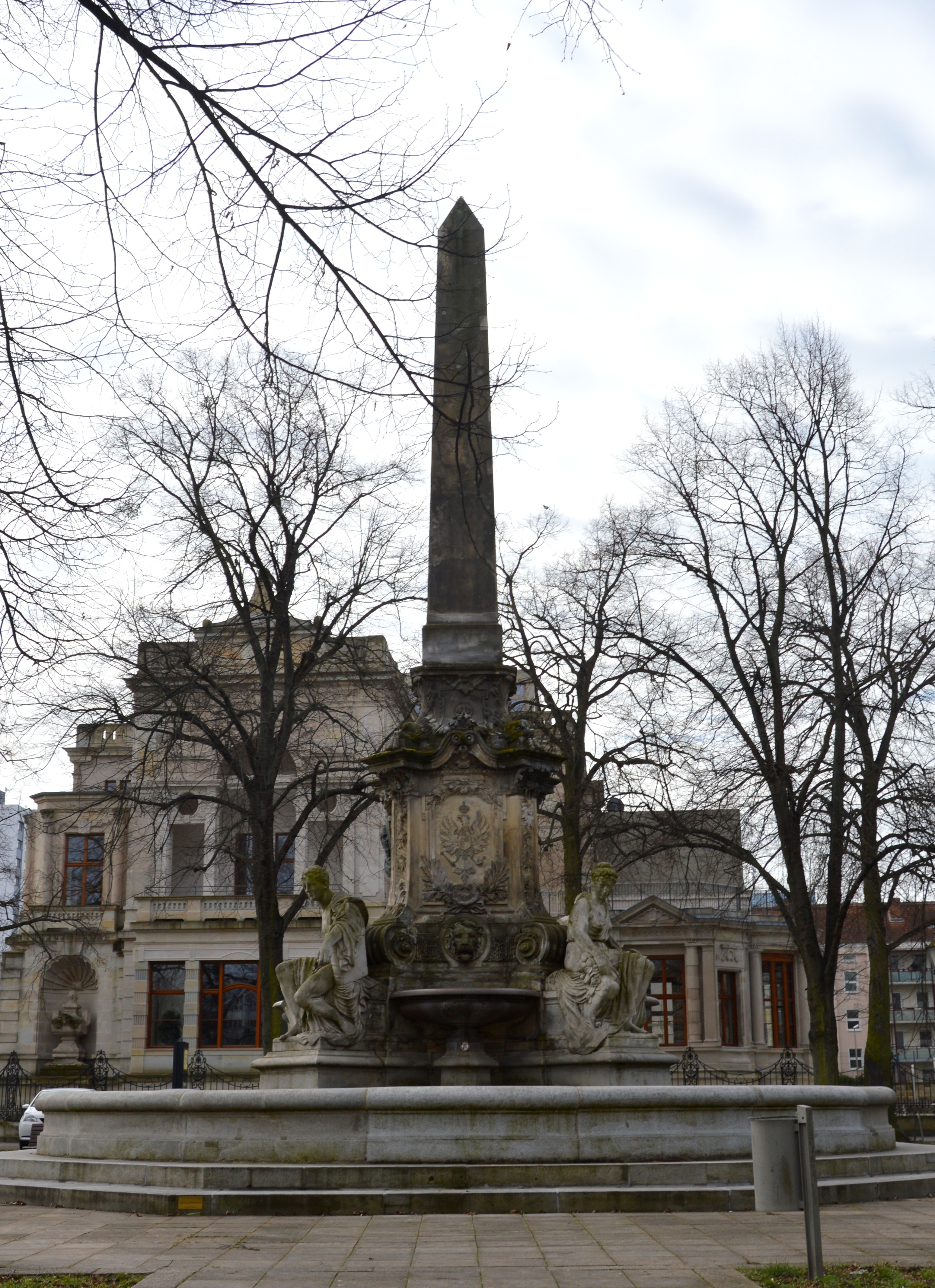 Hasselbachbrunnen